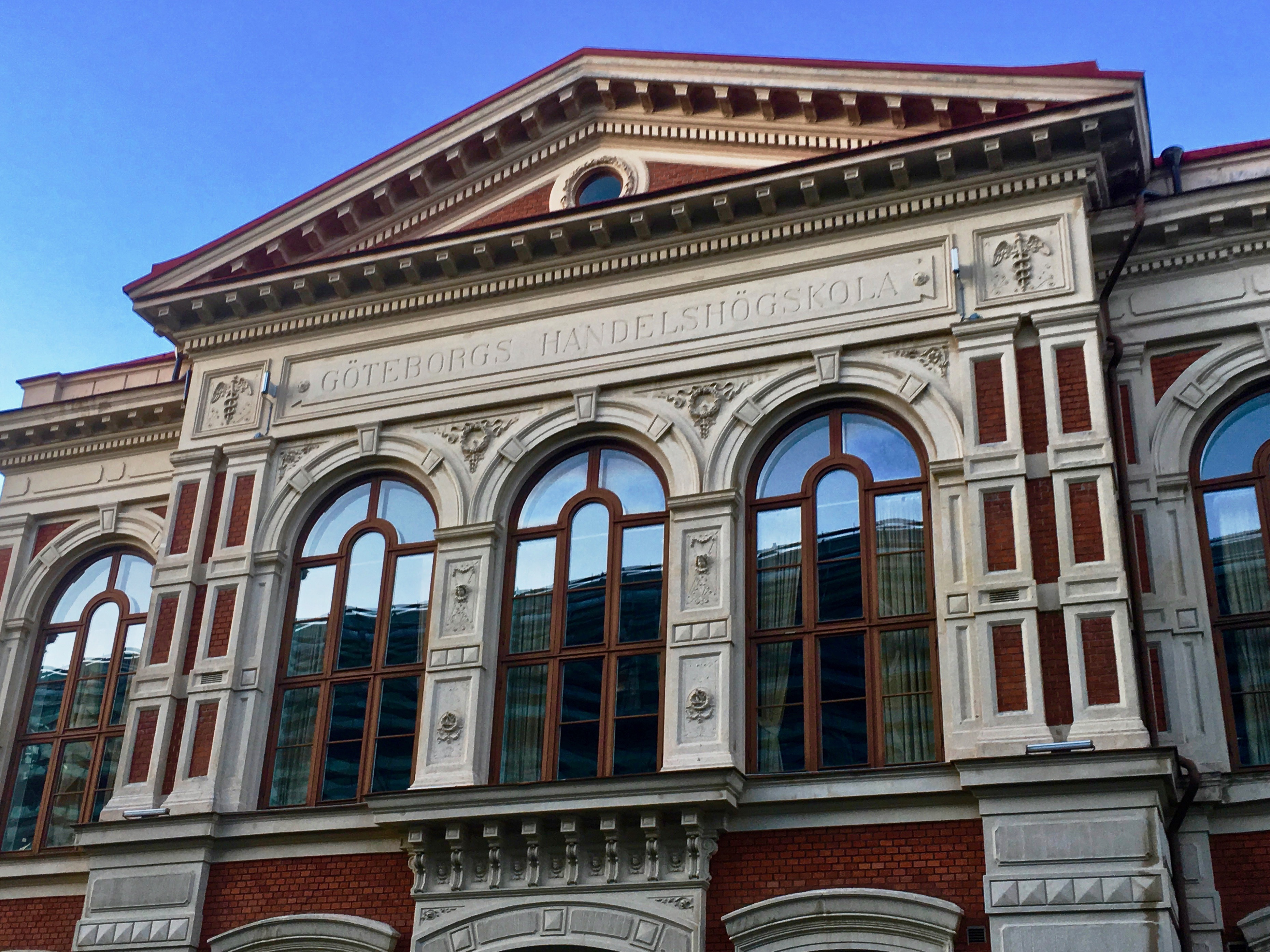 Göteborgs Handelshögskolas lokaler låg vid Läroverksgatan 6 i Göteborg mellan 1915 och 1925.